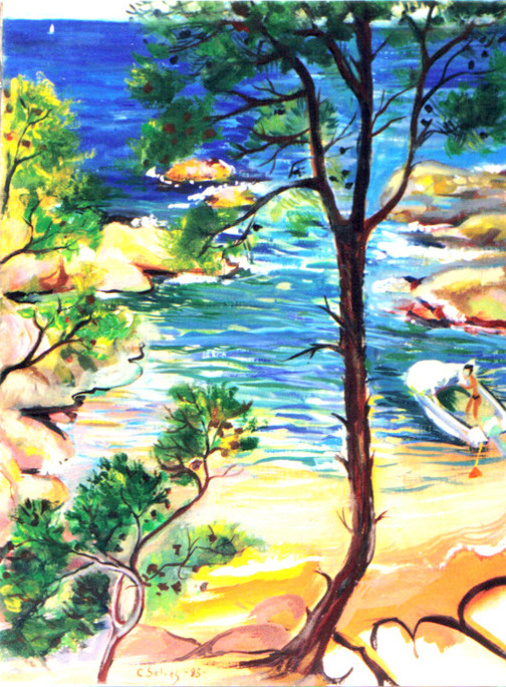 Costa Brava, Platja d'Aro 1985 huile peinte par Carmen Selves Photo libérée du droit d'auteur